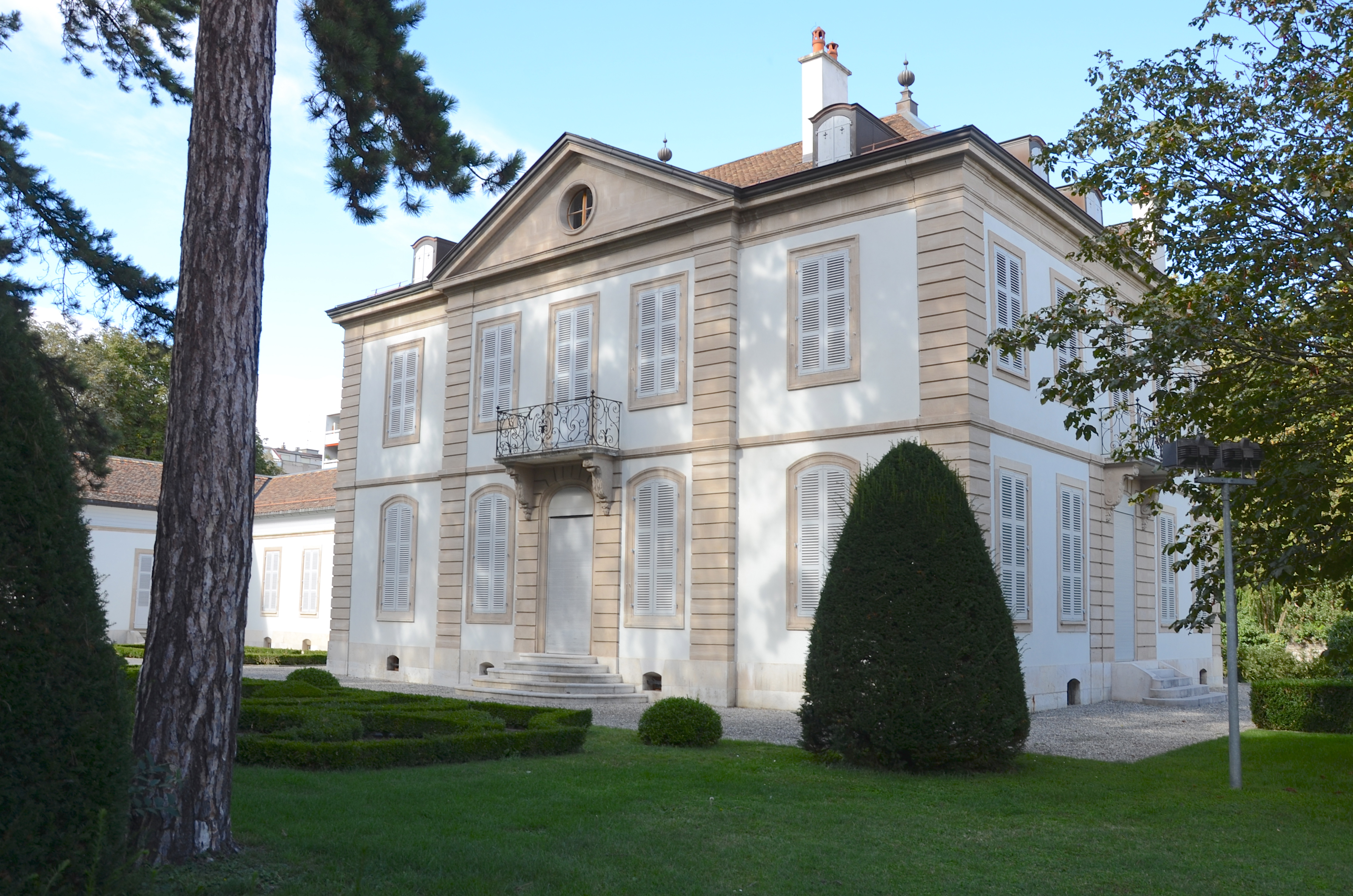 Institut et Musée Voltaire, Rue des Délices 25, Genève